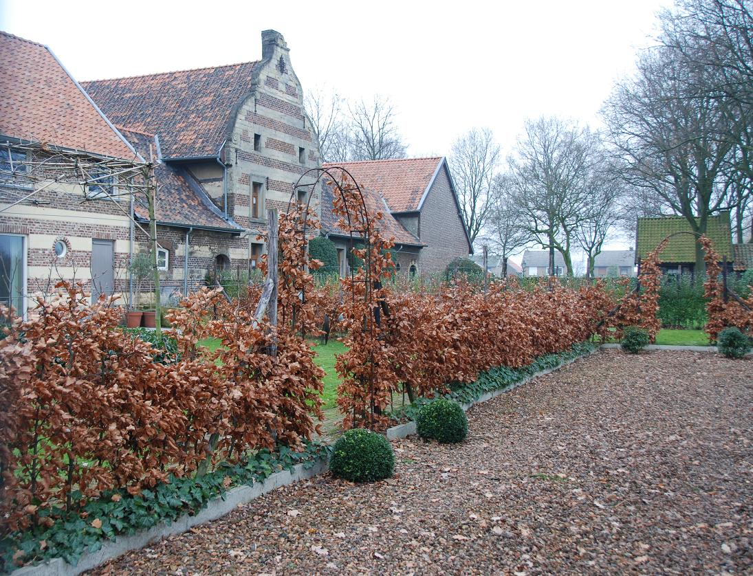 Limburgs: Boerderie in Printhagen (Groat Genhout)